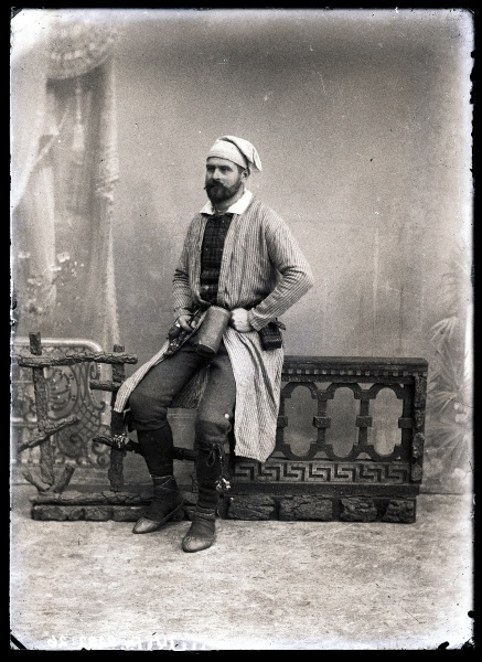 MuuseumikogunegatiividOlemusnegatiivOriginaaloriginaalSäilivusrahuldavEraldatavad osadMaterjal klaas (kolloodiumnegatiiv) Värvus mustvalge Mõõdud laius: 13.0 cm; pikkus: 18.0 cm viited Täisportree ateljees. Ajaloomuuseum 11684:244 kommentaar Negatiiv "Estonica" albumis olevale fotole.